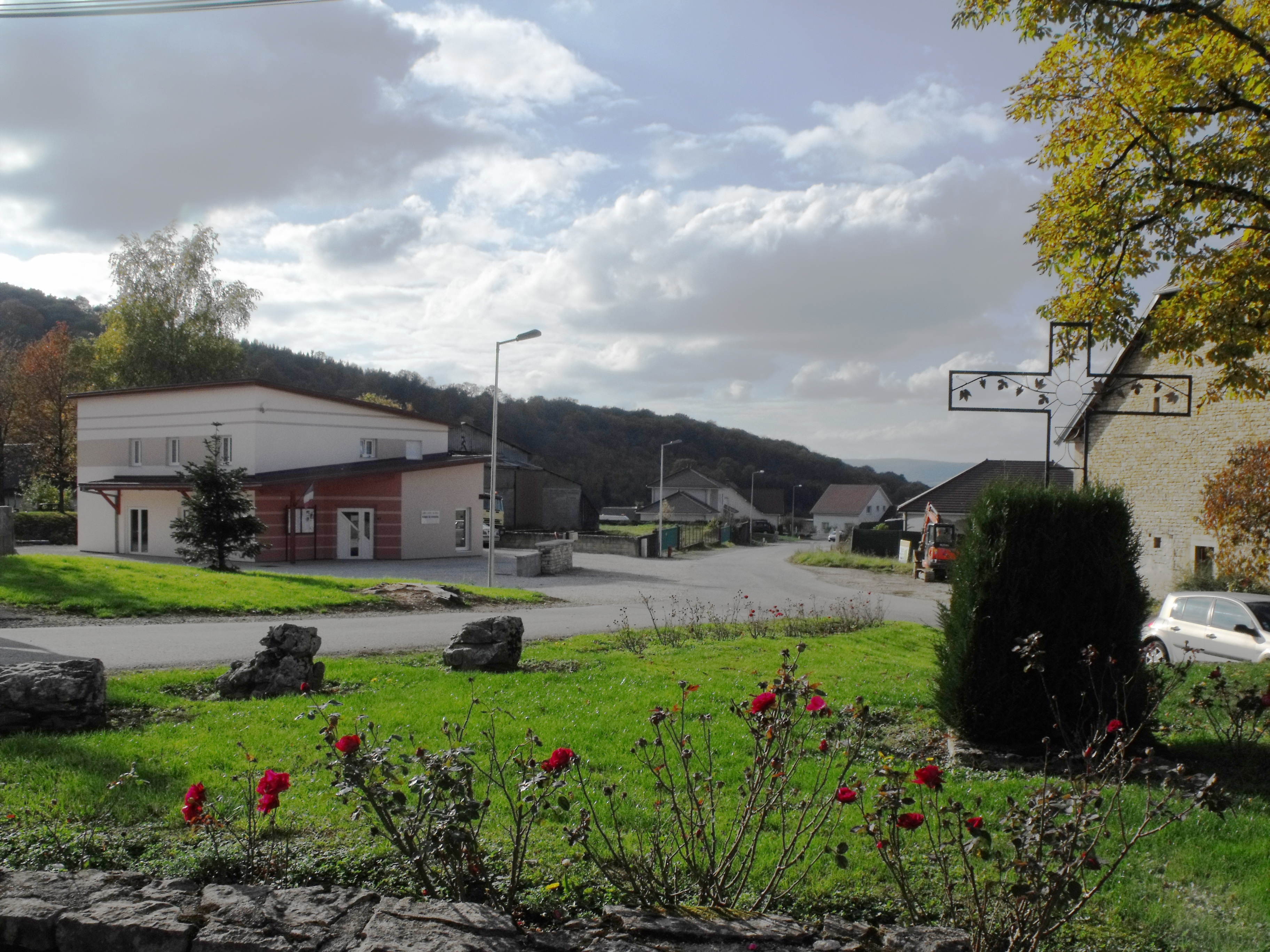 Croix et mairie de Vennans, Doubs, France